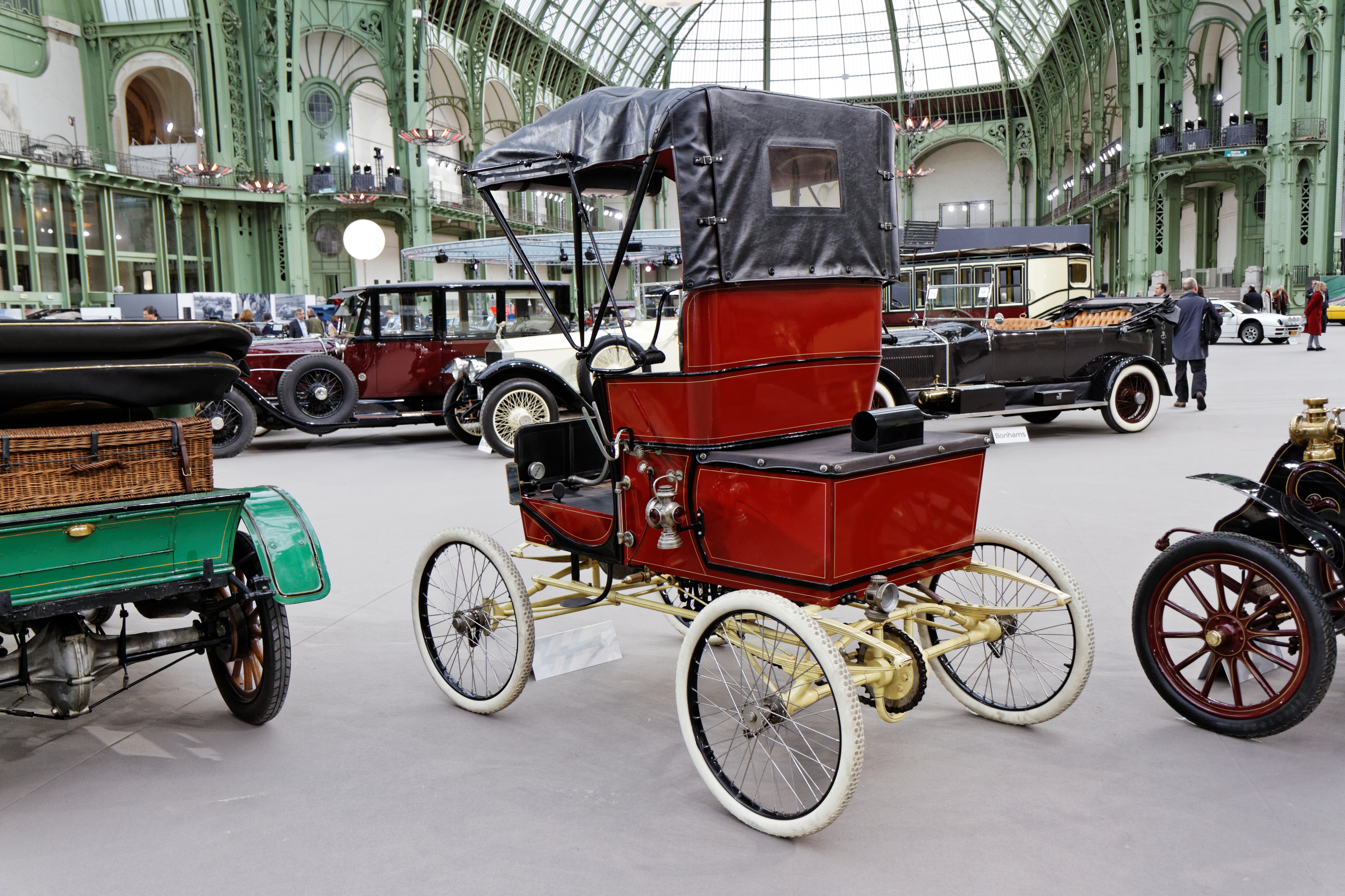 Une Marlboro Steam Runabout au Grand Palais lors de la vente Bonhams en février 2014.